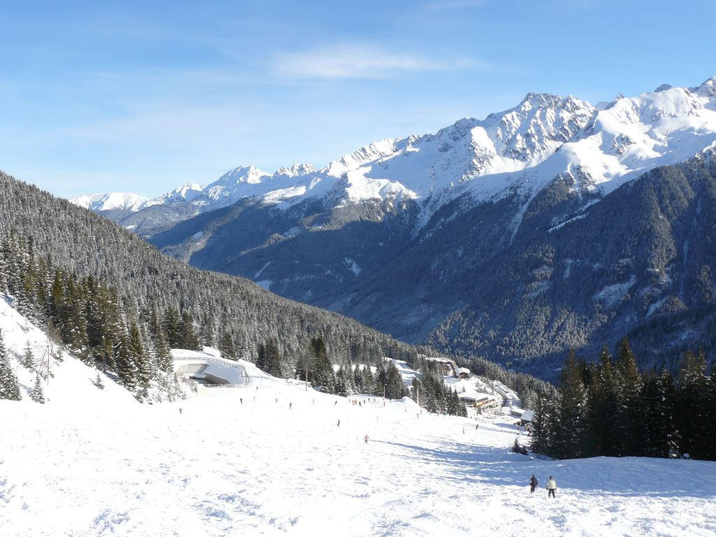 View of 7 Laux ski ressort (Le Pleynet)